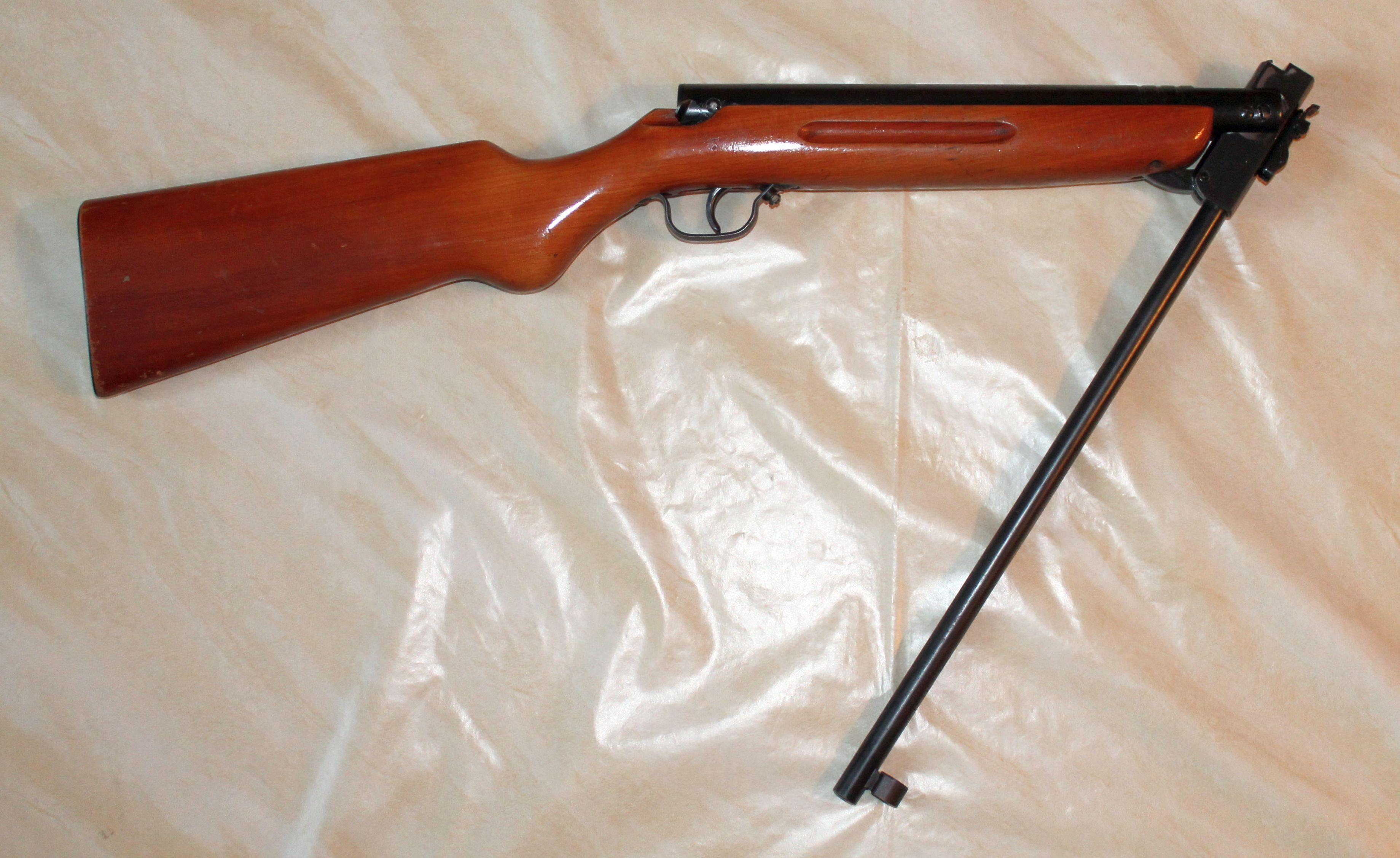 Haenel-Luftgewehr III-284 von 1962. Lauf gekippt, Feder gespannt.